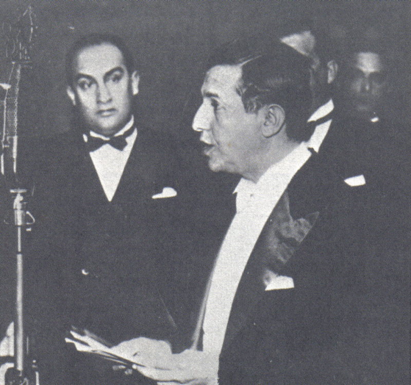 Assis Chateubriand na inauguração da Rádio Tupi, 4 de setembro de 1937